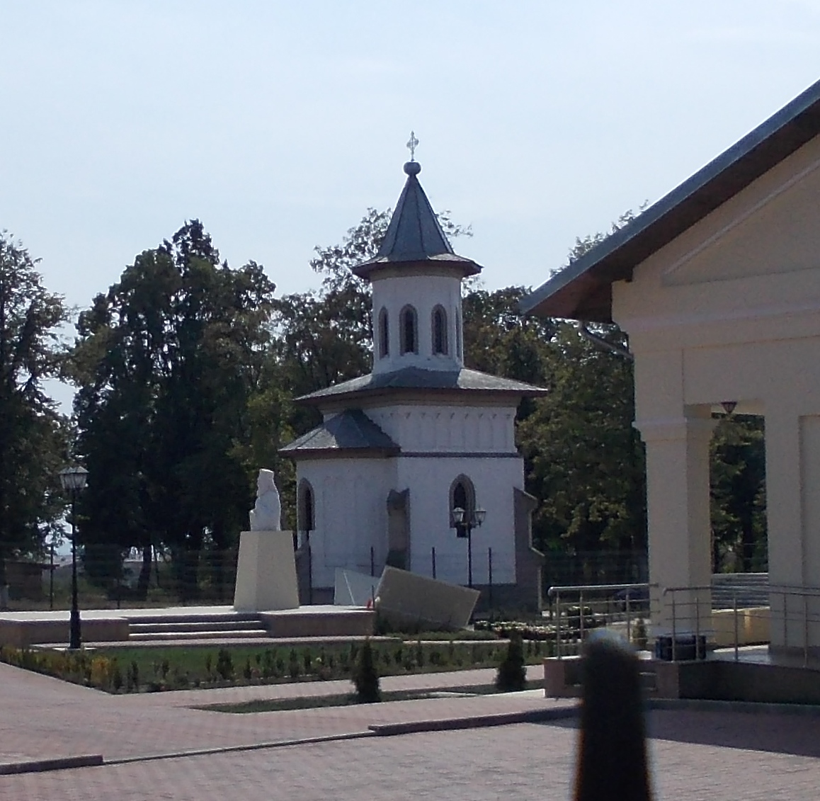 Capela episcopului M. Ștefănescu 02